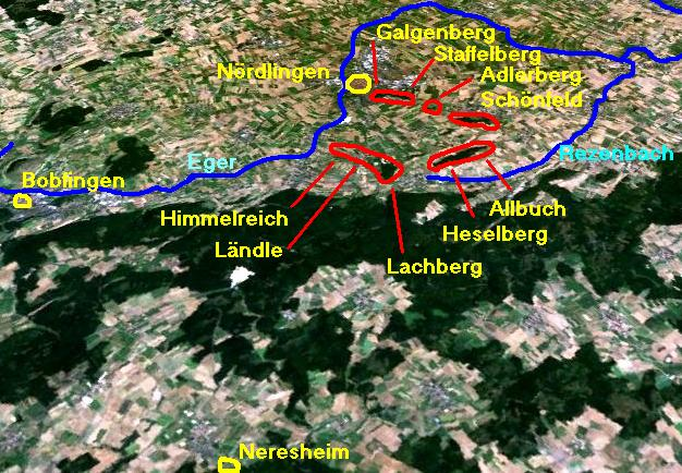 Battle of Nördlingen (map).